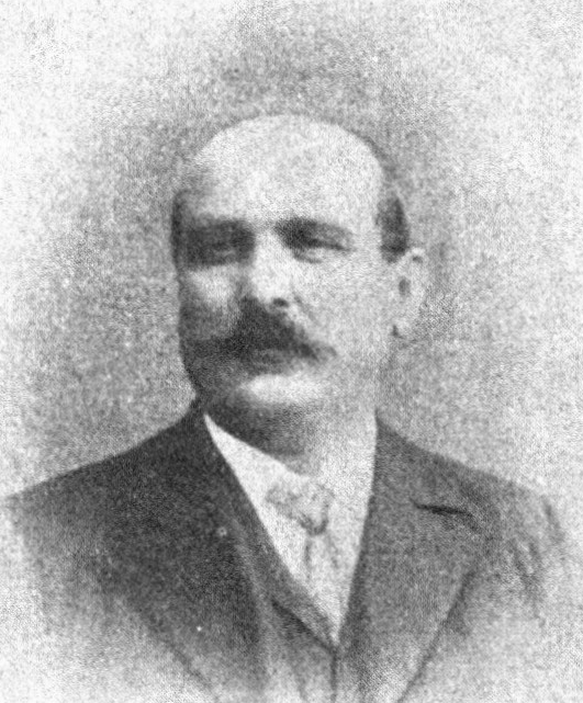 Österreichischer Politiker, Reichsratswahl 1907, Name siehe Dateiname